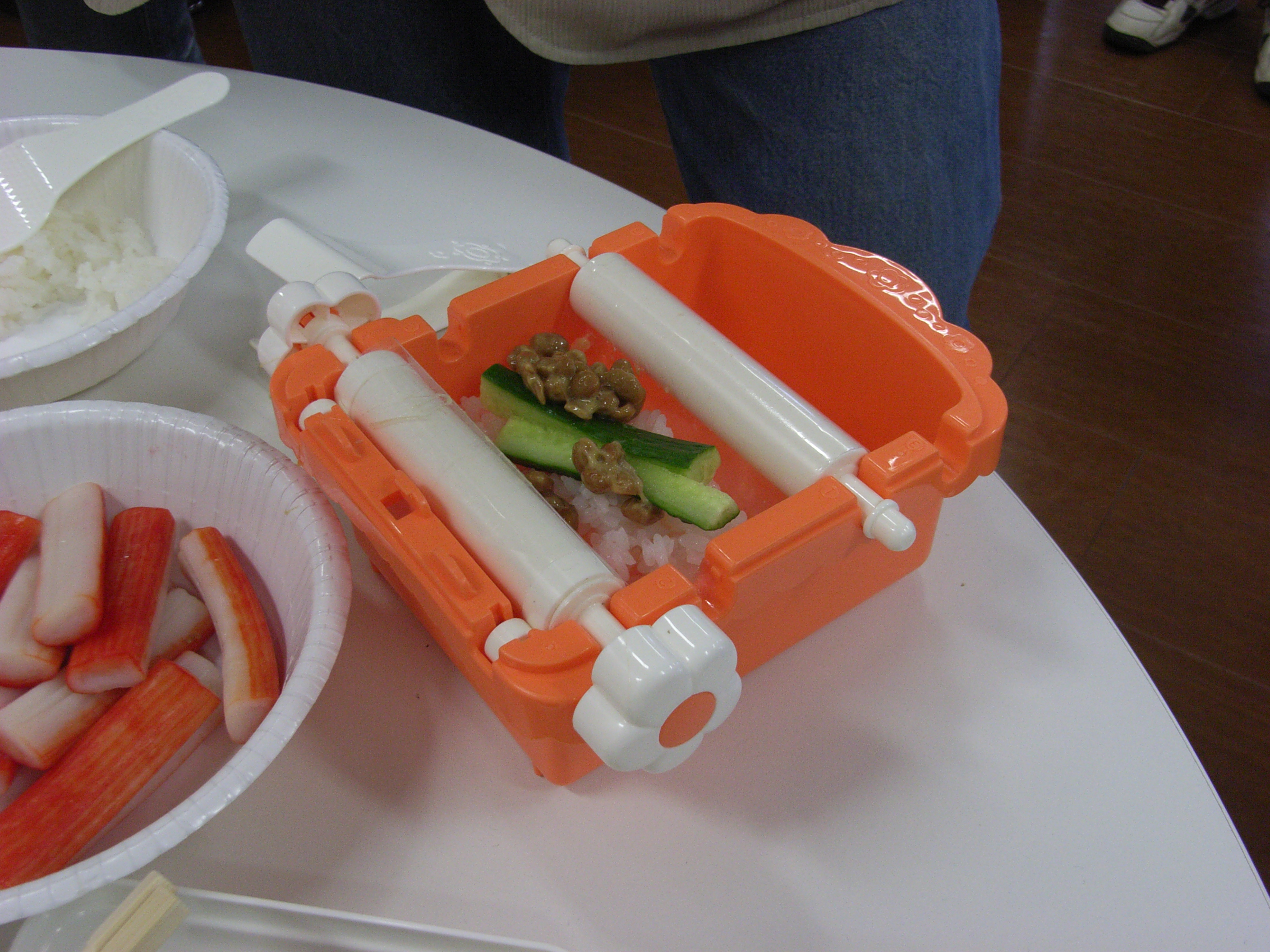 失敗。